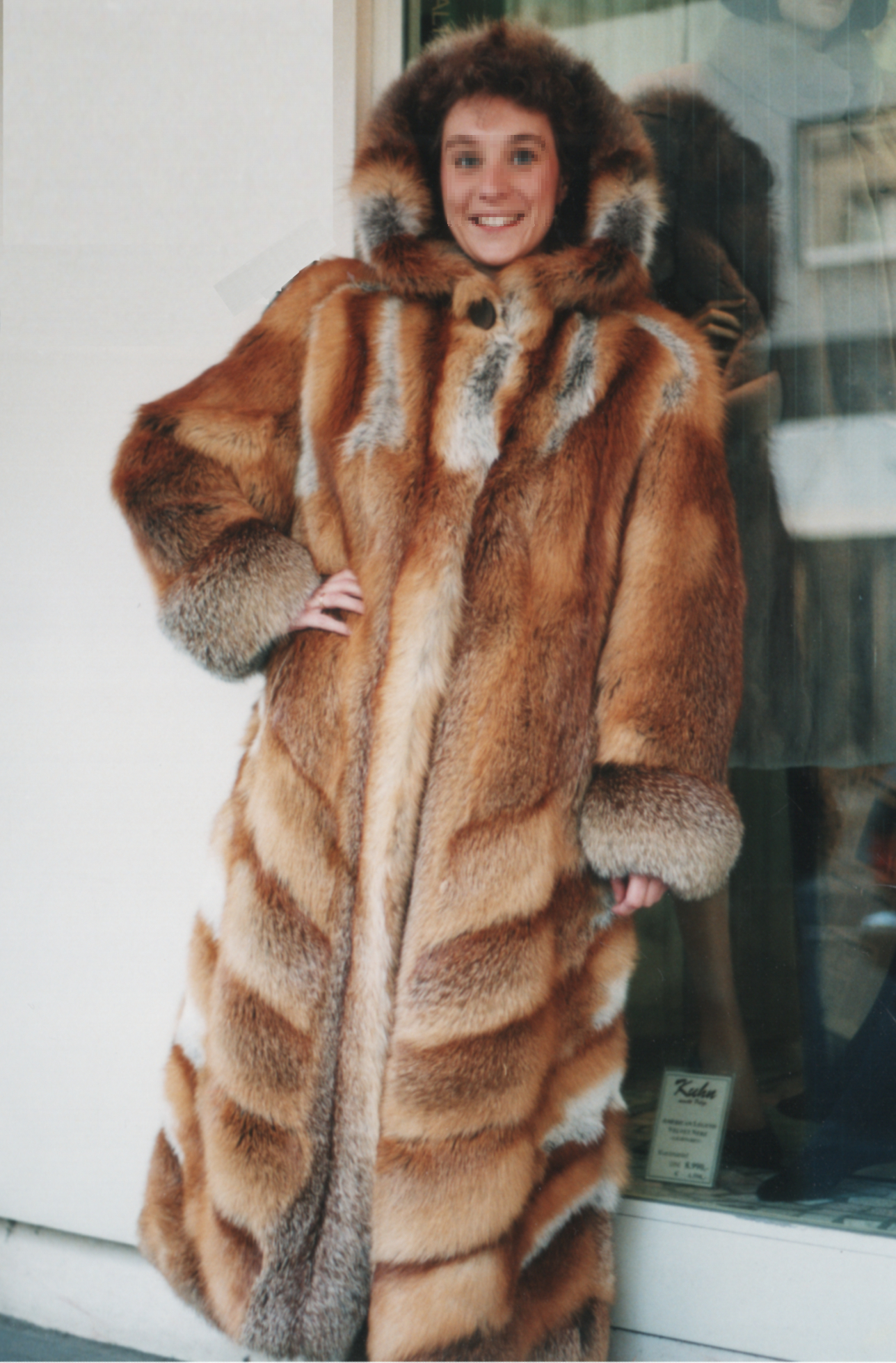 Rotfuchsmantel, gearbeitet aus 24 Fellen, dem Jagdergebnis zweier Jäger.